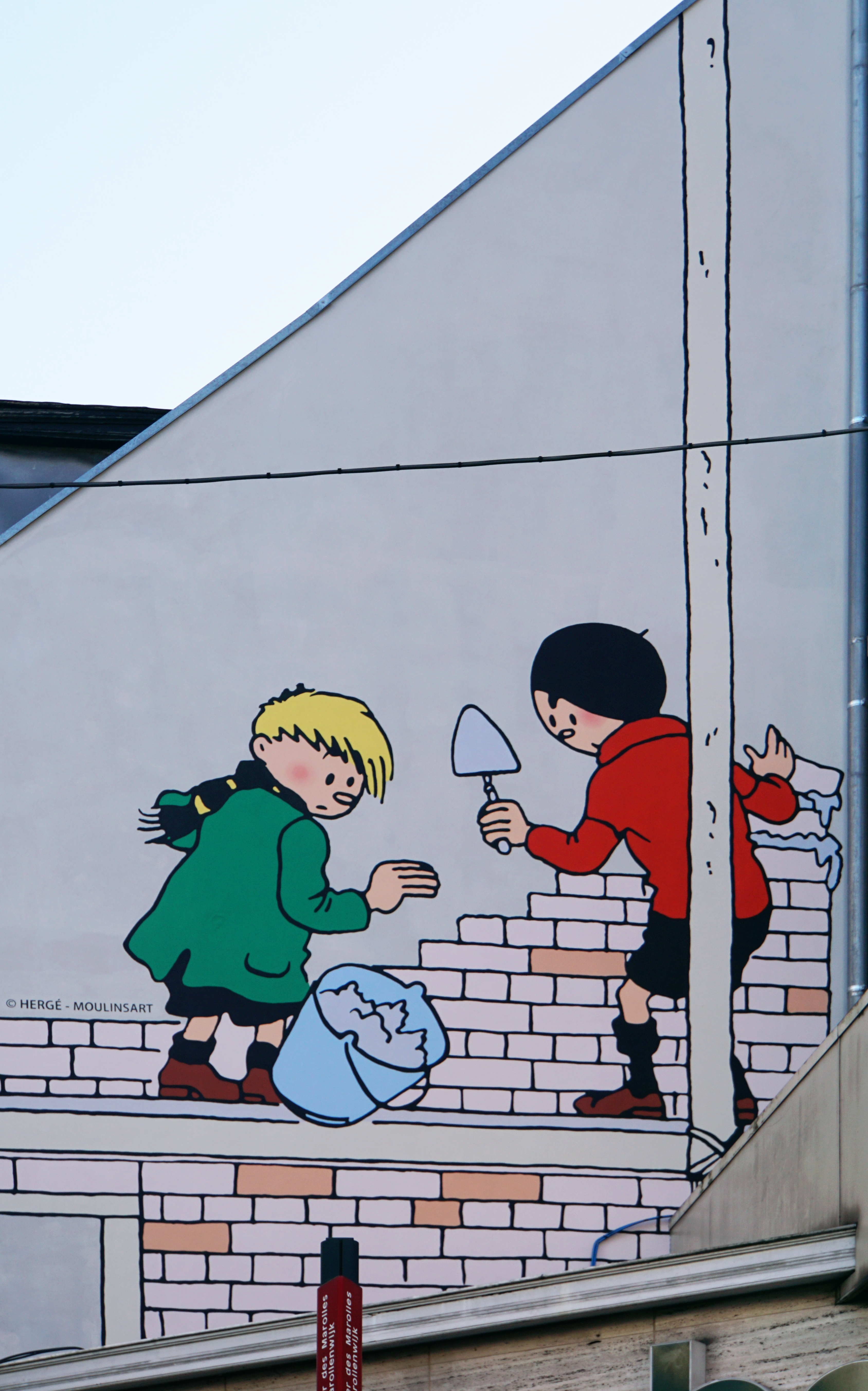 Stups-und-Steppke-Wandgemälde in der Rue Notre-Seigneur in Brüssel (Parcours bande dessinée)[1]